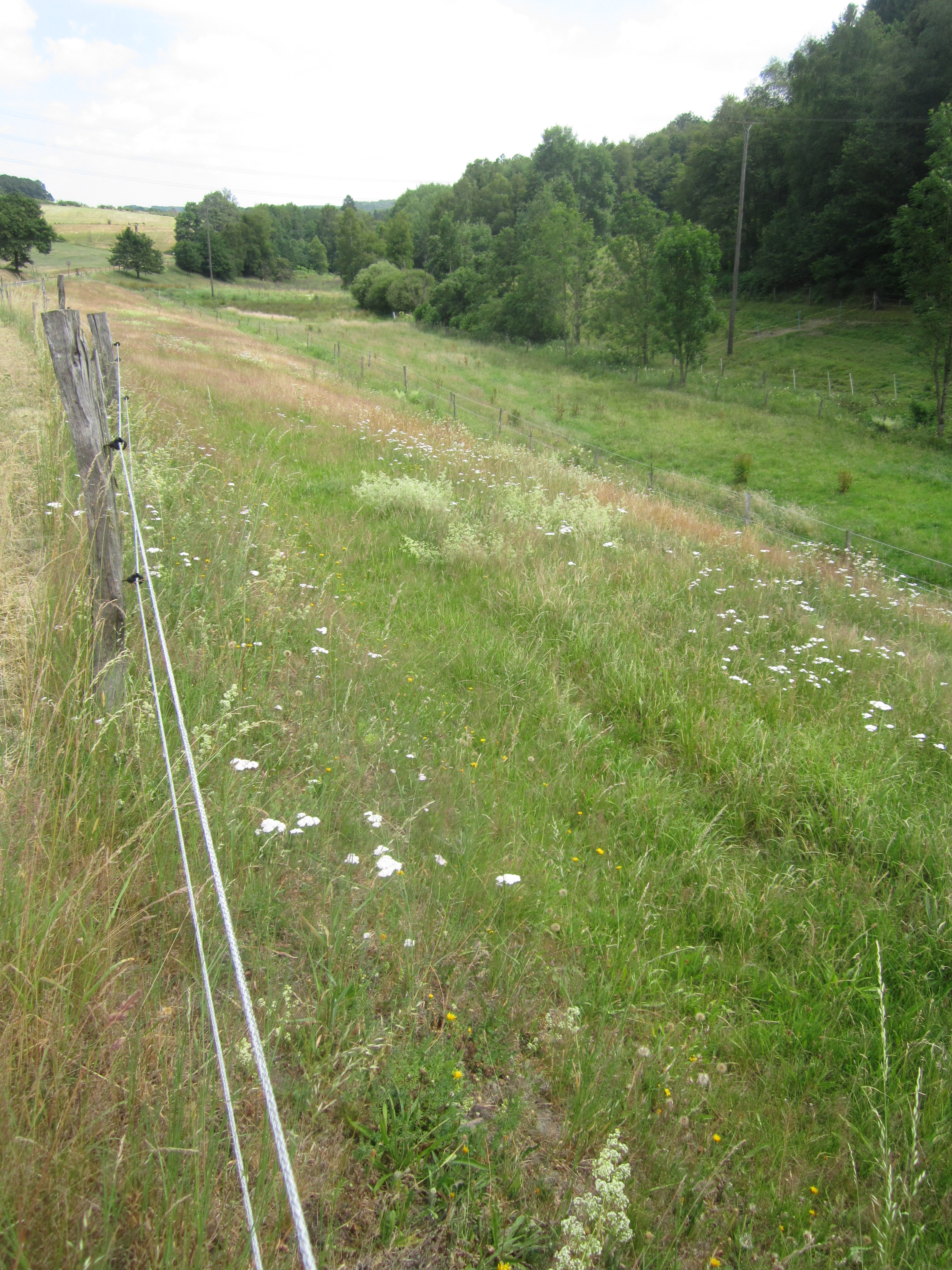 NSG Feldbachtal, rechts der Feldbach.